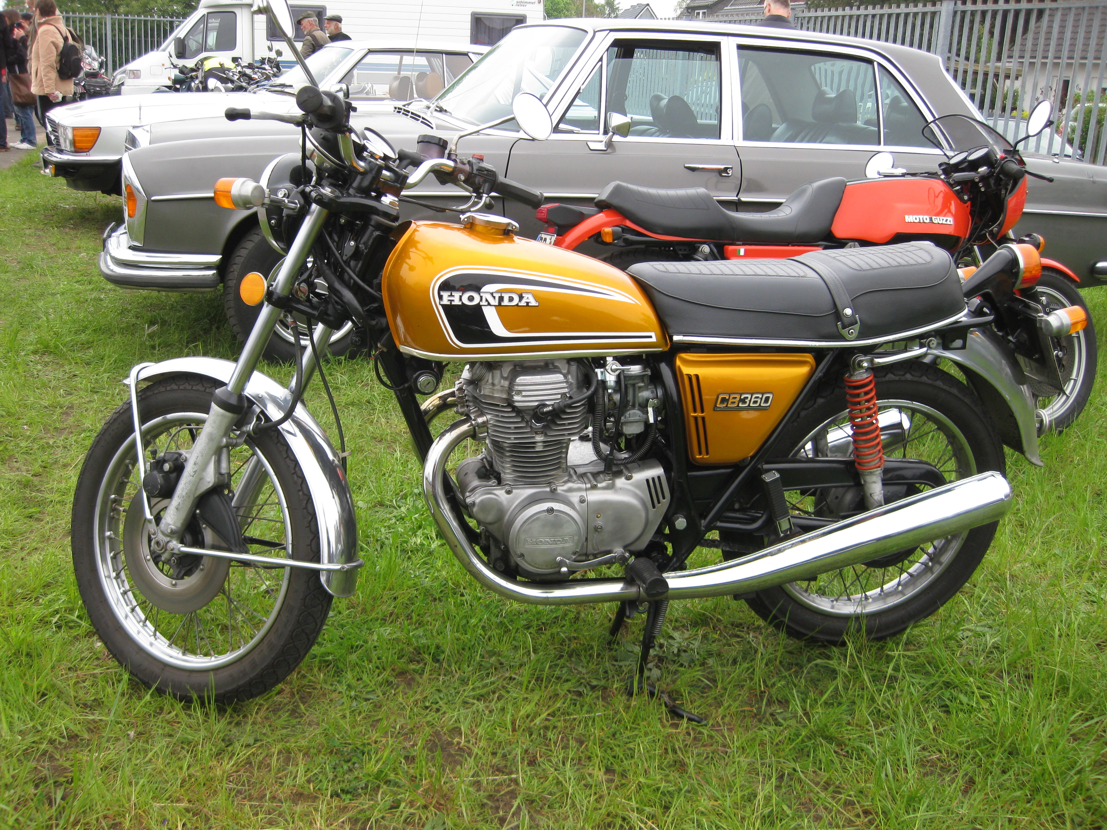 Honda CB360